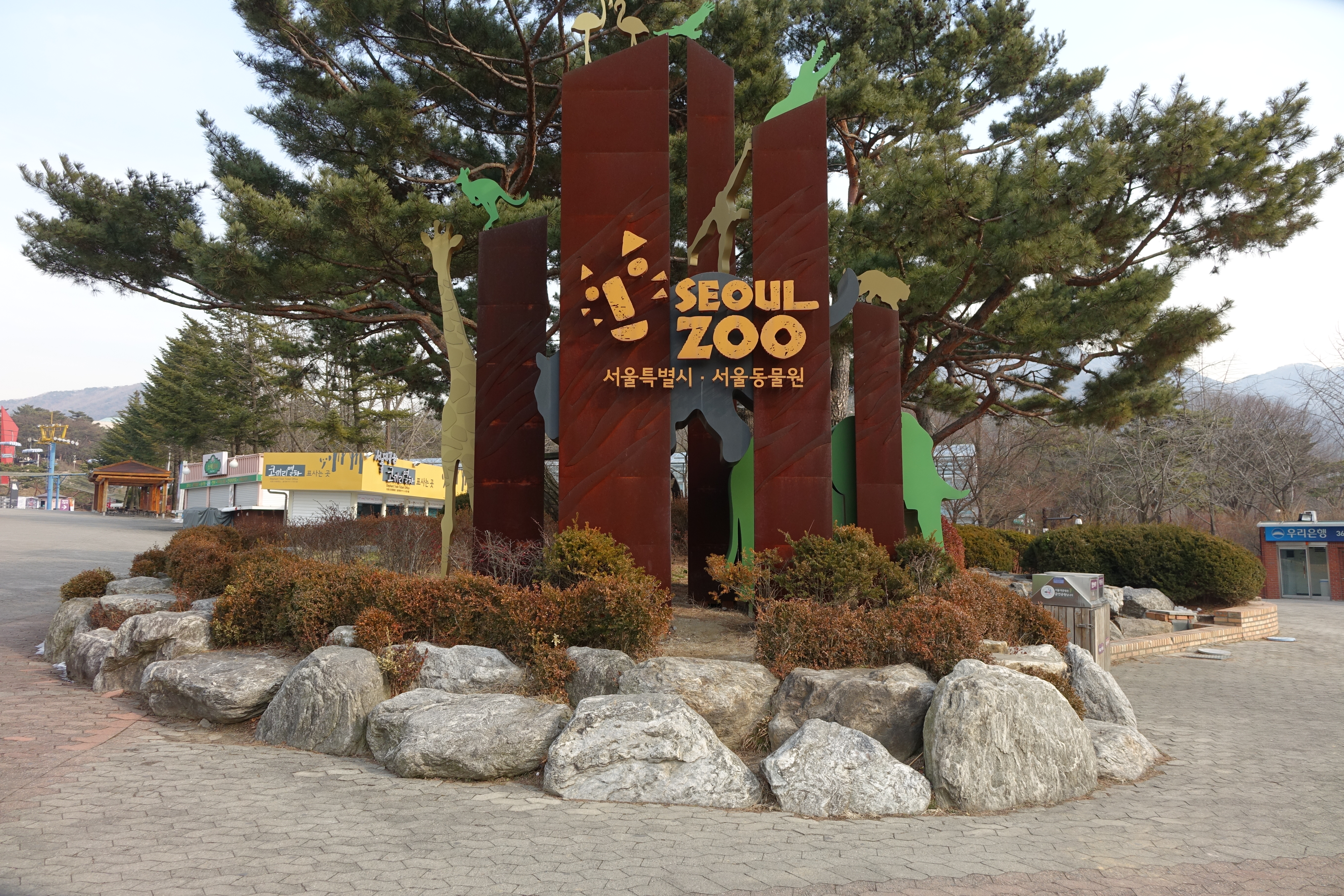 서울대공원